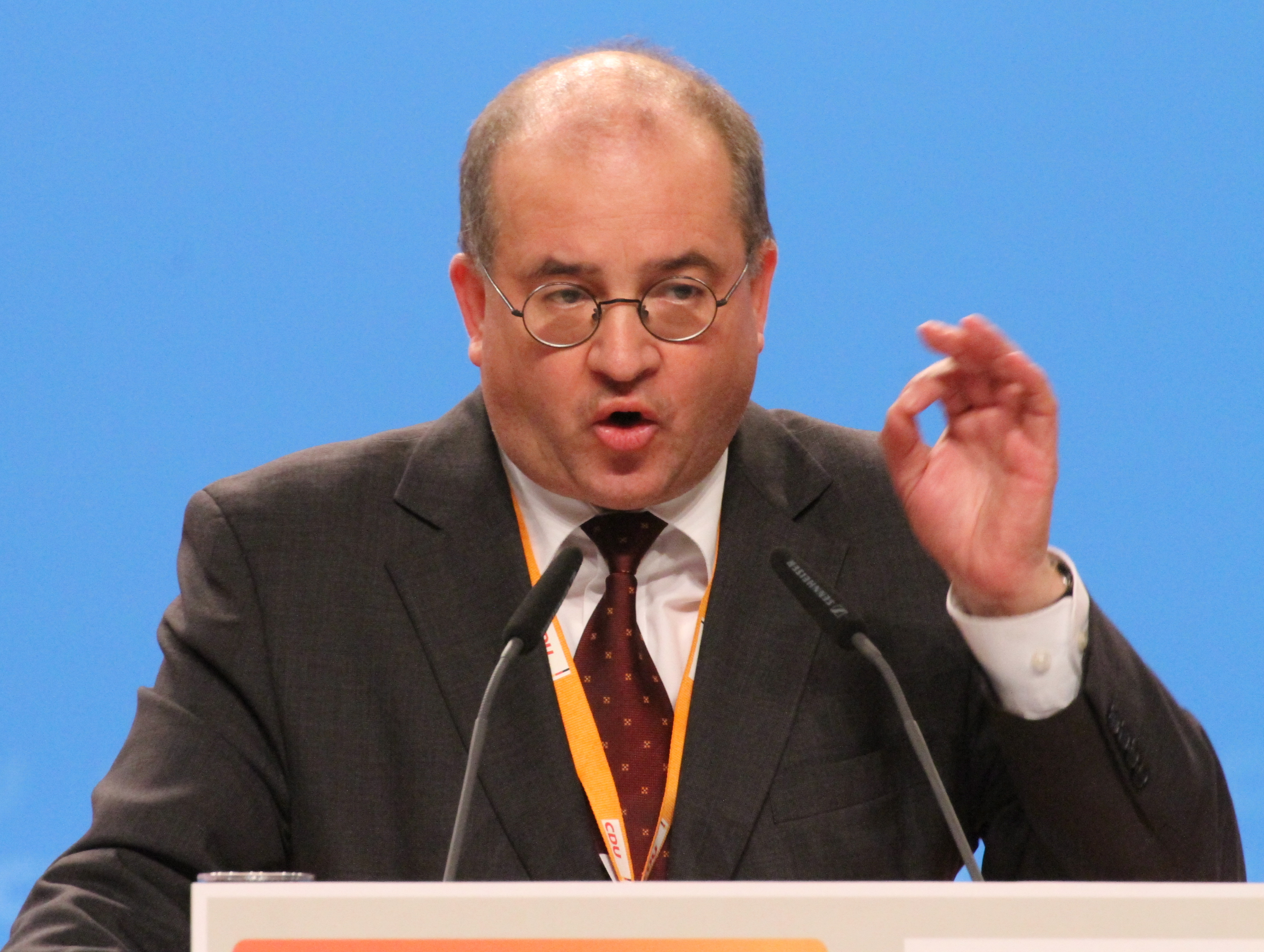 Arnold Vaatz auf dem CDU Bundesparteitag Dezember 2014 in Köln